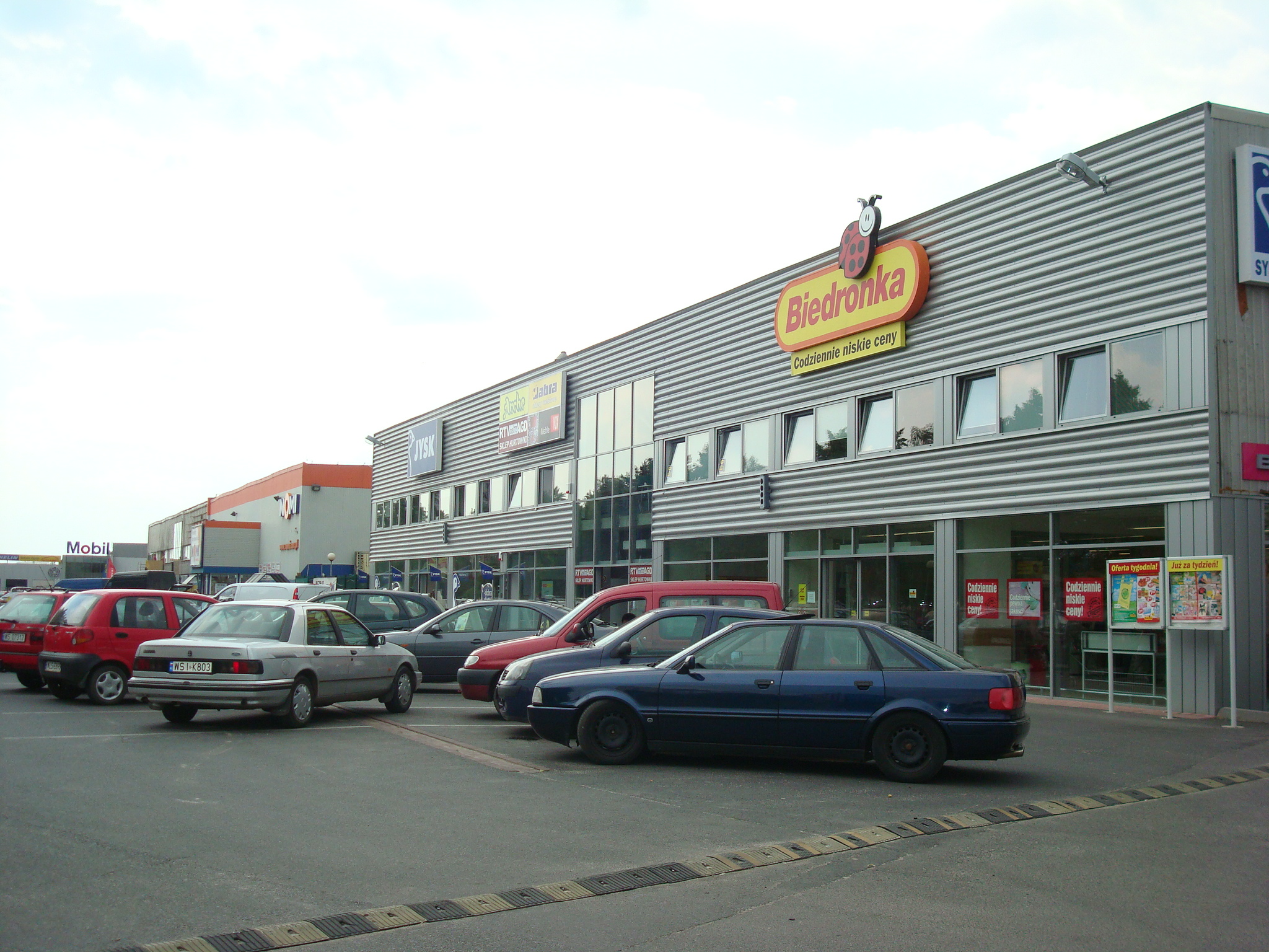 C.H.Arche